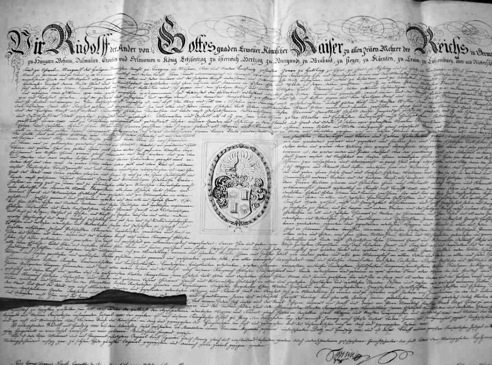 Adelsbrief 1598 von Kaiser Rudolf II. für Martin Kriegelstein auf Wandelburg (gestorben 1603), Stettmeister zu Colmar, Vogt zu Sulzmatt, mit dem künftigen Namen „Kriegelstein von Wandelburg“ für ihn und seine Töchter, die adelsrechtlich ausnahmsweise befugt werden, den Adelsstand an ihre ehelichen Nachkommen vererben zu können, da Martin Kriegelstein keine Söhne hatte. Wappenbesserung des bereits 1504 von Maximilian I. an die Kriegelstein zu Colmar verliehenen Wappens: Hinzufügen eines roten Turmes im 2. und 3. Feld (Bezug auf Wandelburg, welche Burg zu Sulzmatt durch Martin Kriegelstein wieder instandgesetzt worden war).